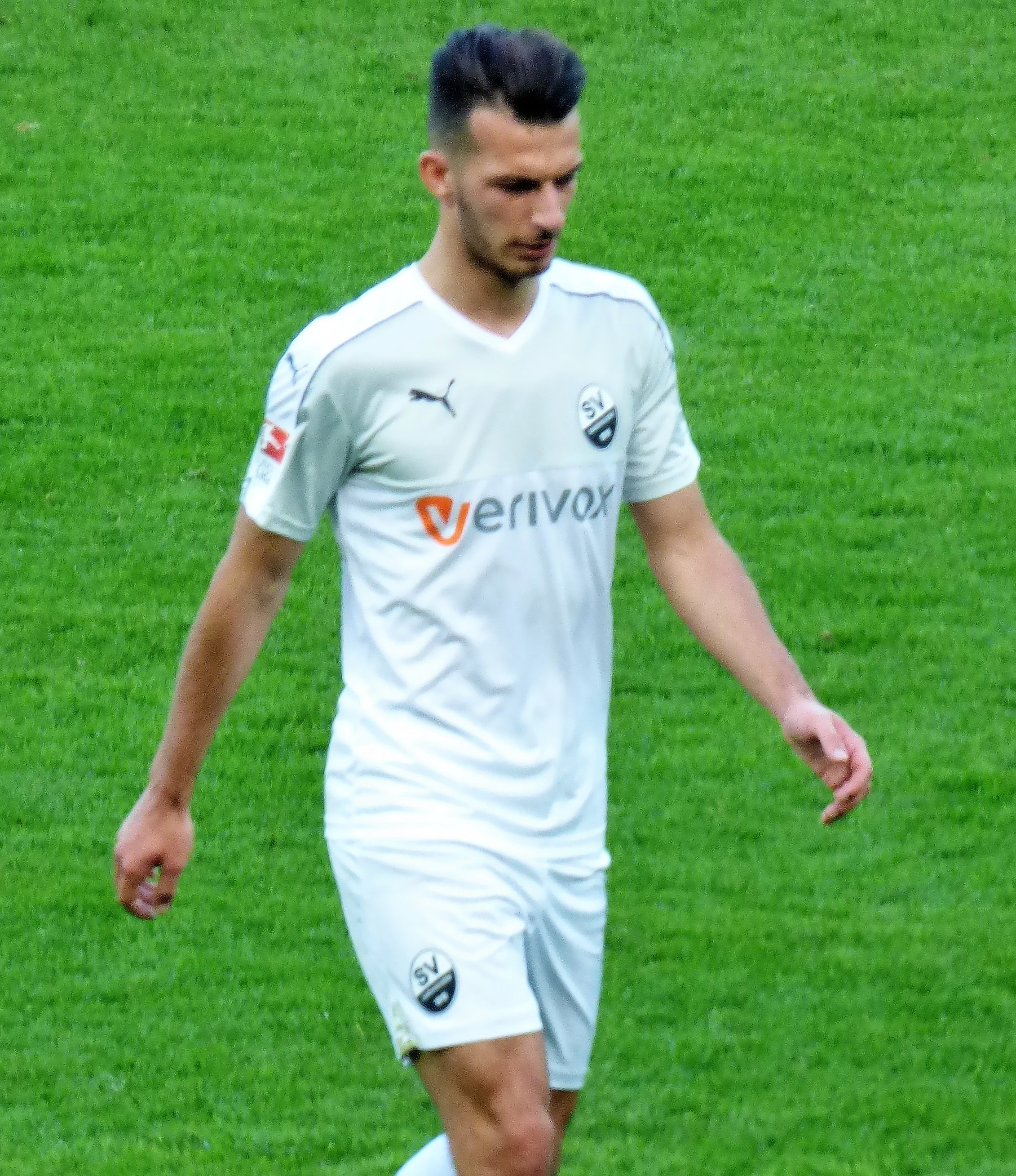 Leart Paqarada 2017